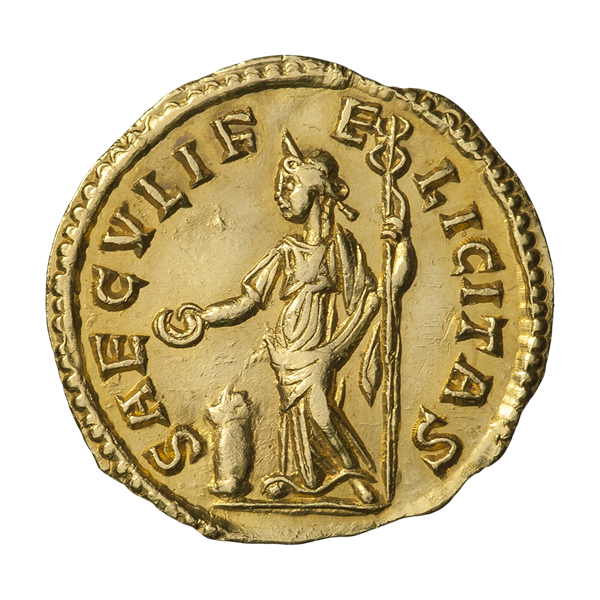 Ауреус. Тетрик I Старший. Ок. 271—274 гг. (реверс). Надпись SAECVLI FELICITAS. Фелицита (персонификация счастья и успеха) стоит, влево; в правой руке держит патеру над жертвенным алтарем, в левой руке кадуцей.